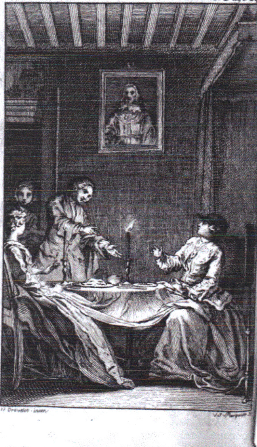 Première traduction de Tom Jones en français, tome II. Estampe de Gravelot illustrant le quiproquo de la page 240 : l'aubergiste, prenant Sophia Western pour Jenny Cameron jure qu'il ne la trahira pas et elle craint qu'il la dénonce à son père « son saisissement lui ôta pour quelques instants la faculté de parler. »